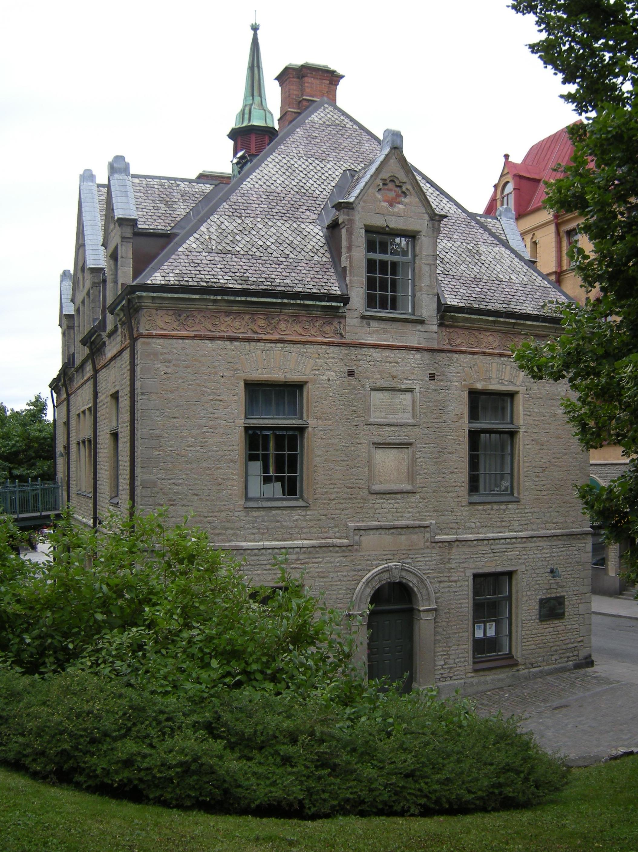 Örebro, Sankt Nikolai församlingshem.